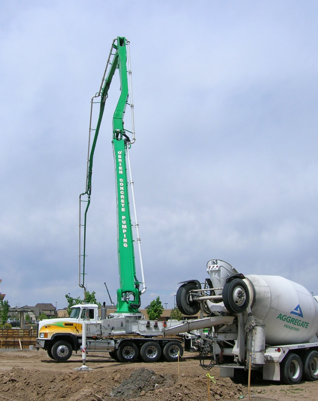 concrete pumper truck, Denver, Colorado / 2006